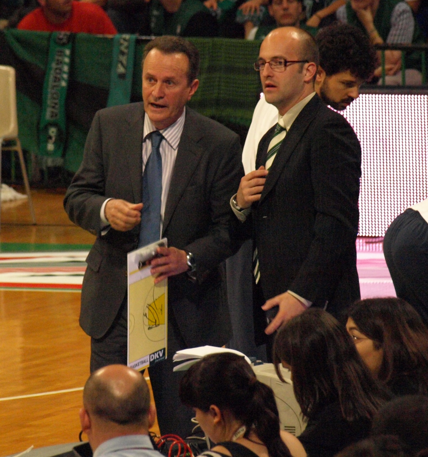 Aito García Reneses junto a uno de sus asistentes en un partido del DKV Jouventut en el Pabellón Olímpico de Badalona en mayo de 2008